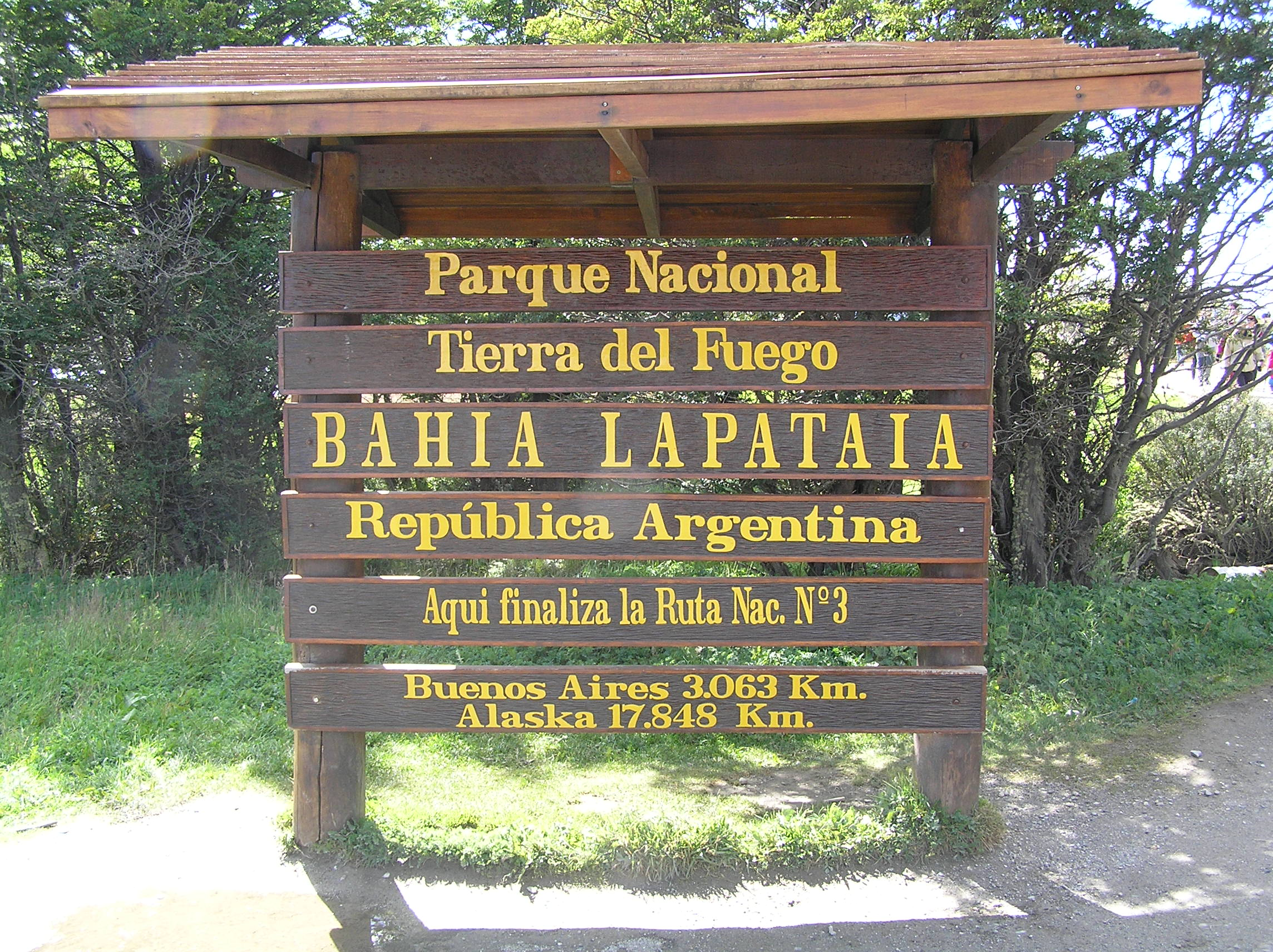 Indicación del Parque Nacional Tierra del Fuego (Argentina) en la Bahía Lapataia. Fin de la Ruta Nacional Nº 3.